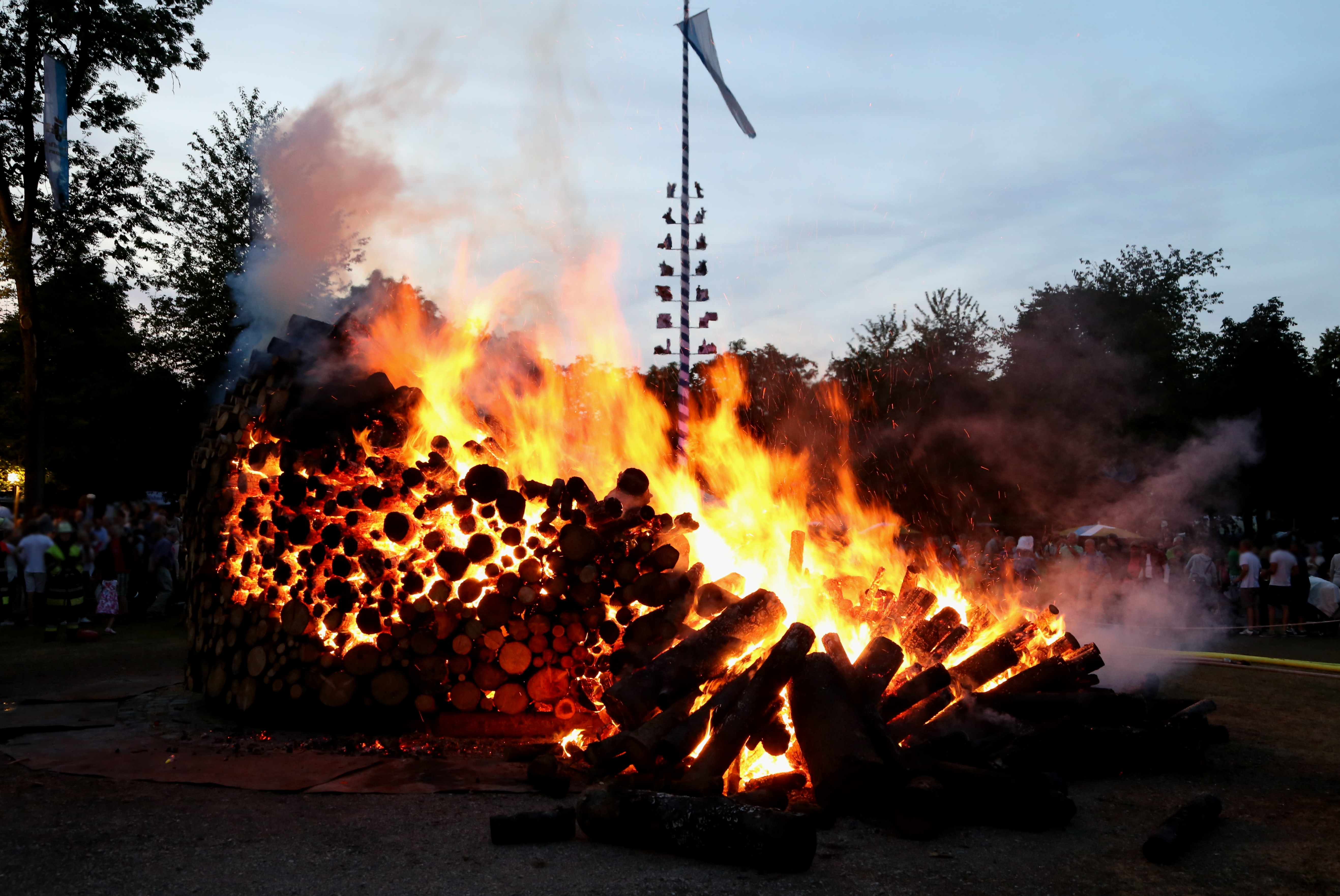 Sommerfeuer auf der Maderwiese in Ottobrunn am 11. Juli 2015